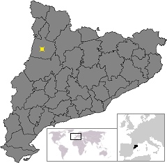 Localització de Tremp. Location of Tremp in Catalonia.